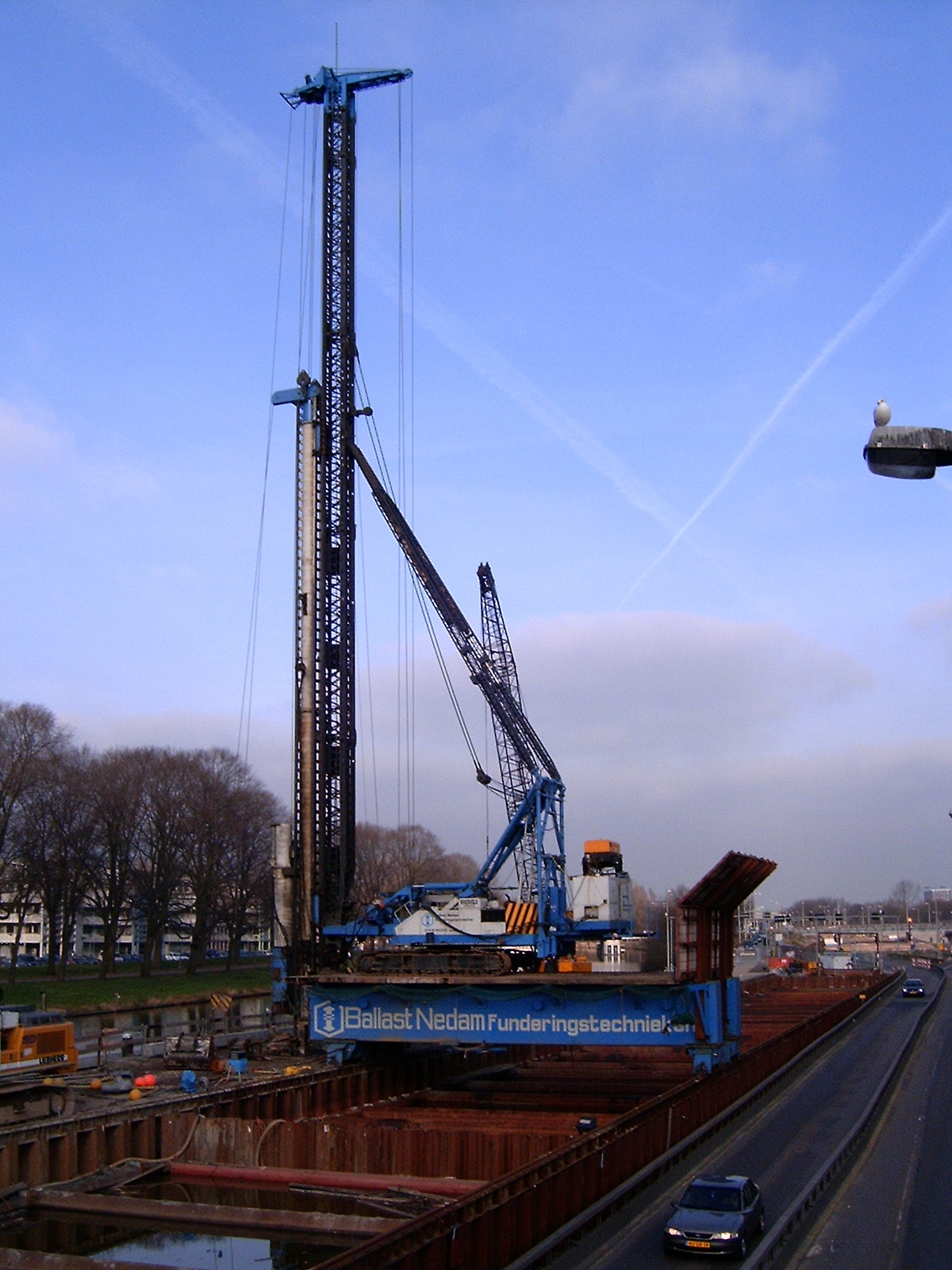 Deep foundation machine in Amsterdam